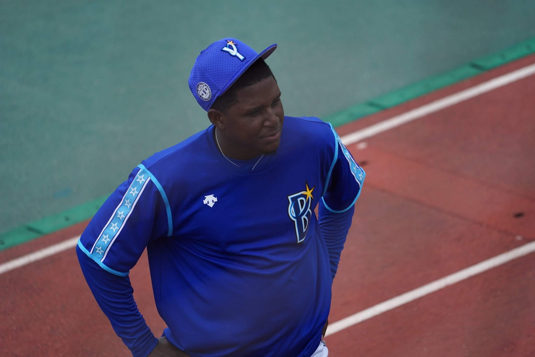 春季キャンプにて